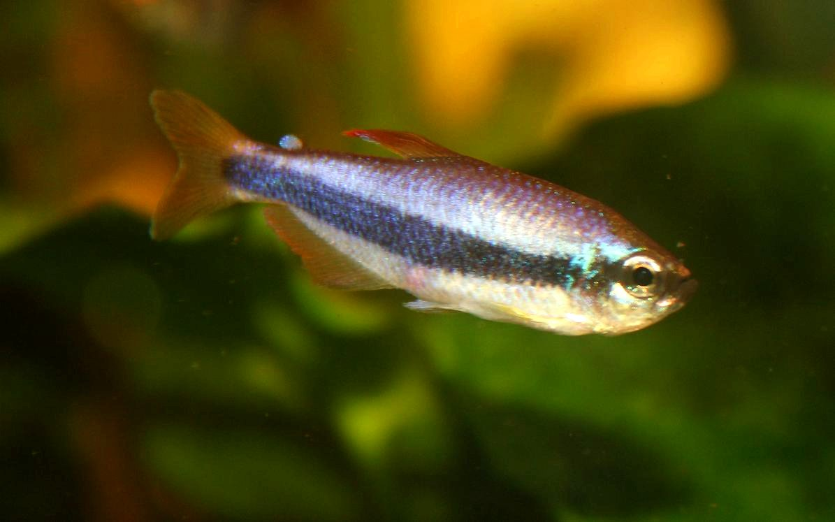 Aragonés: Inpaichtys kerri